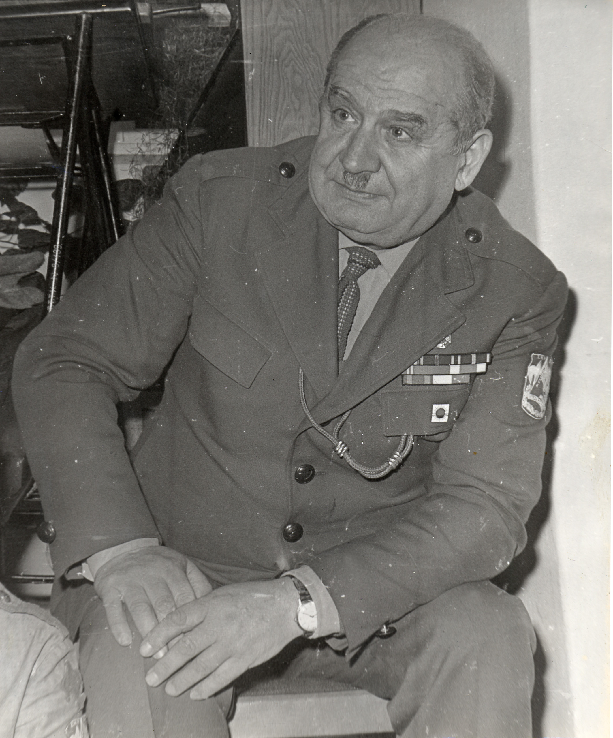 hm. Jerzy Kazimierczuk instruktor Hufca ZHP Warszawa-Mokotów